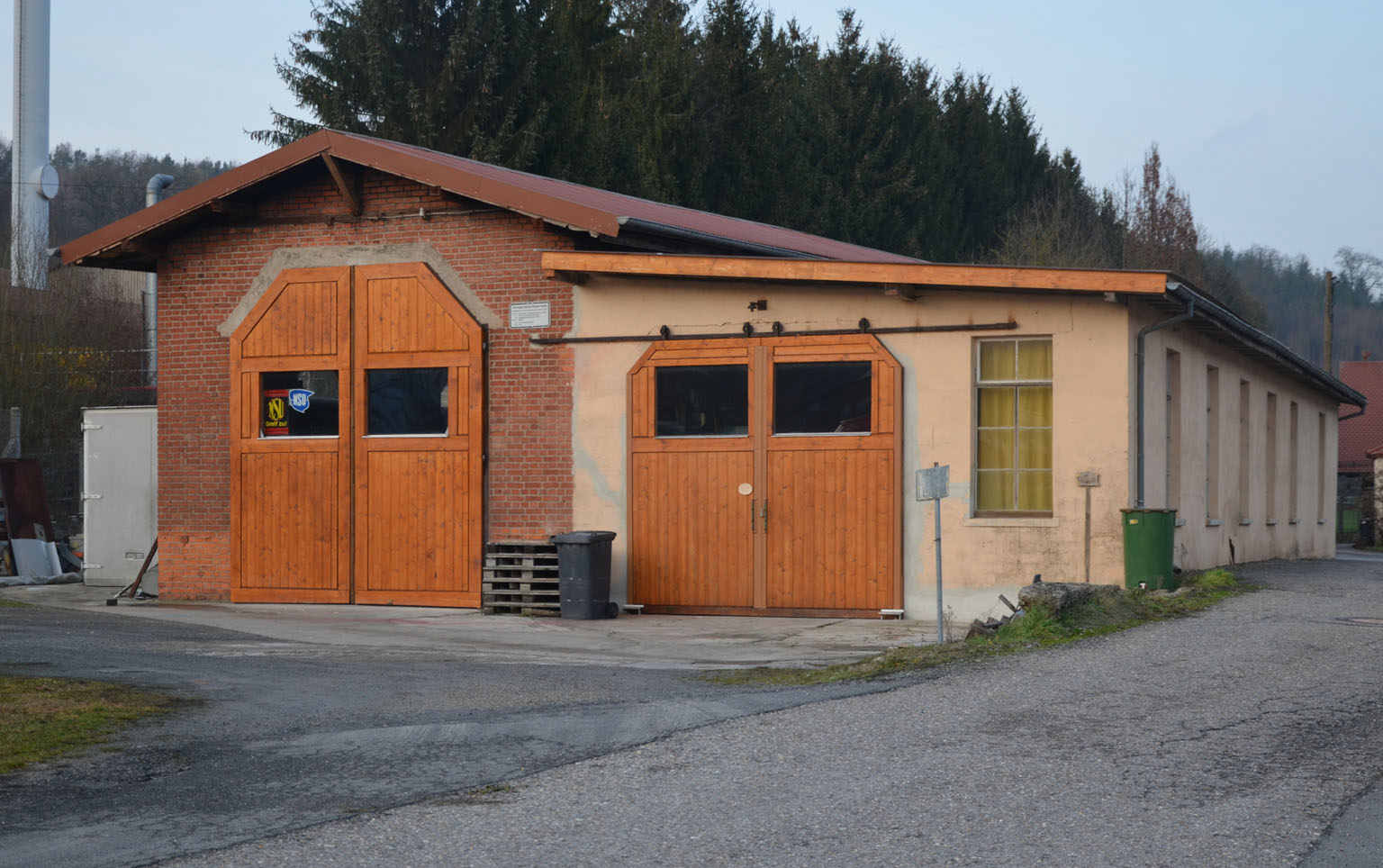 ehemaliger Lokschuppen der Schefflenztalbahn in Billigheim.